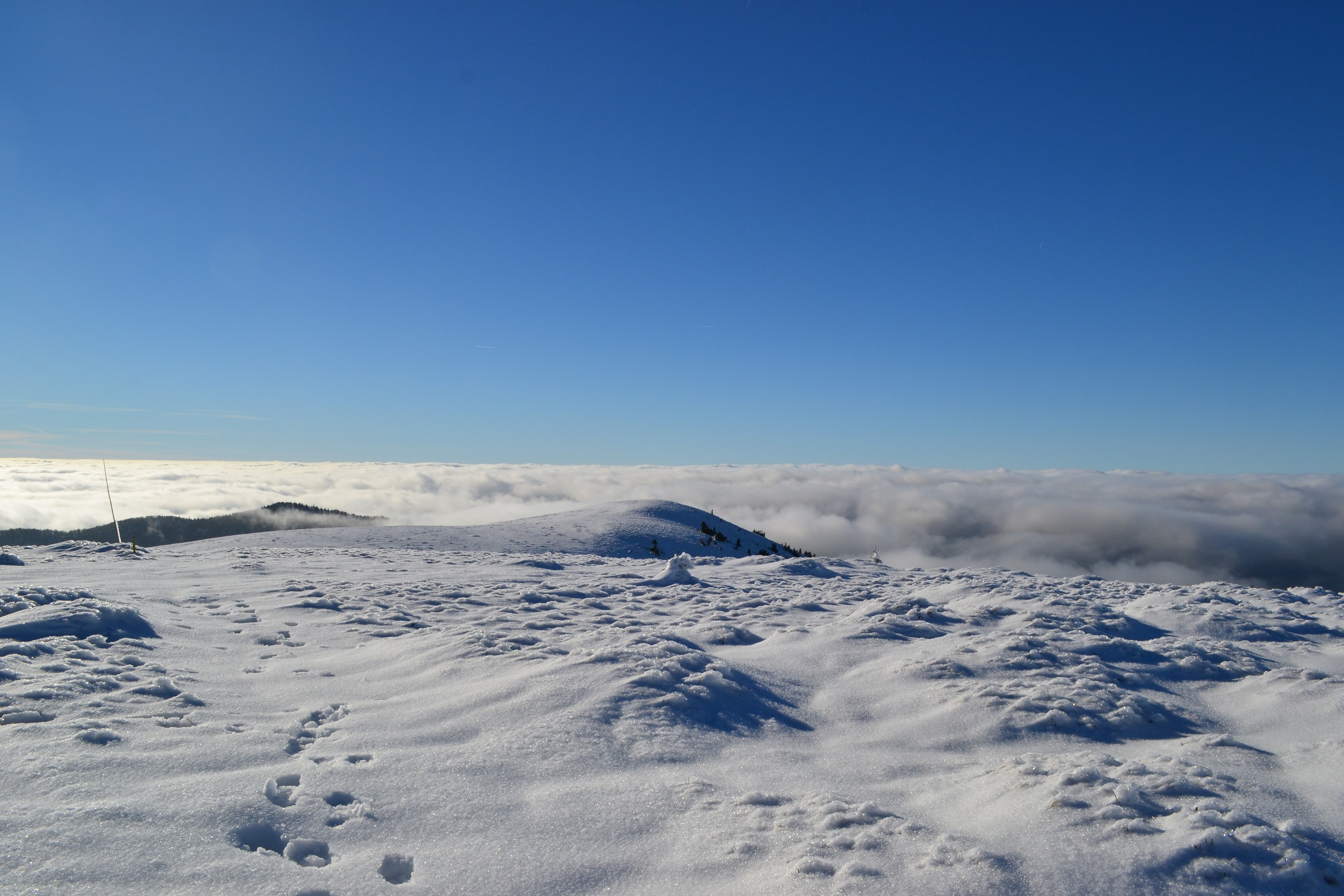 Veterné na Martinských holiach